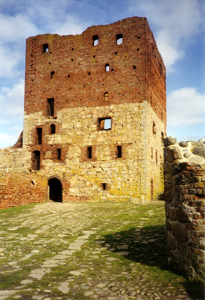 Ruine der Burg Hammershus auf Bornholm originally uploaded on de.wikipedia by Benutzer:Darkone at 23:46, 7. Nov 2109. Filename was Burg Hammershus 3.jpg.